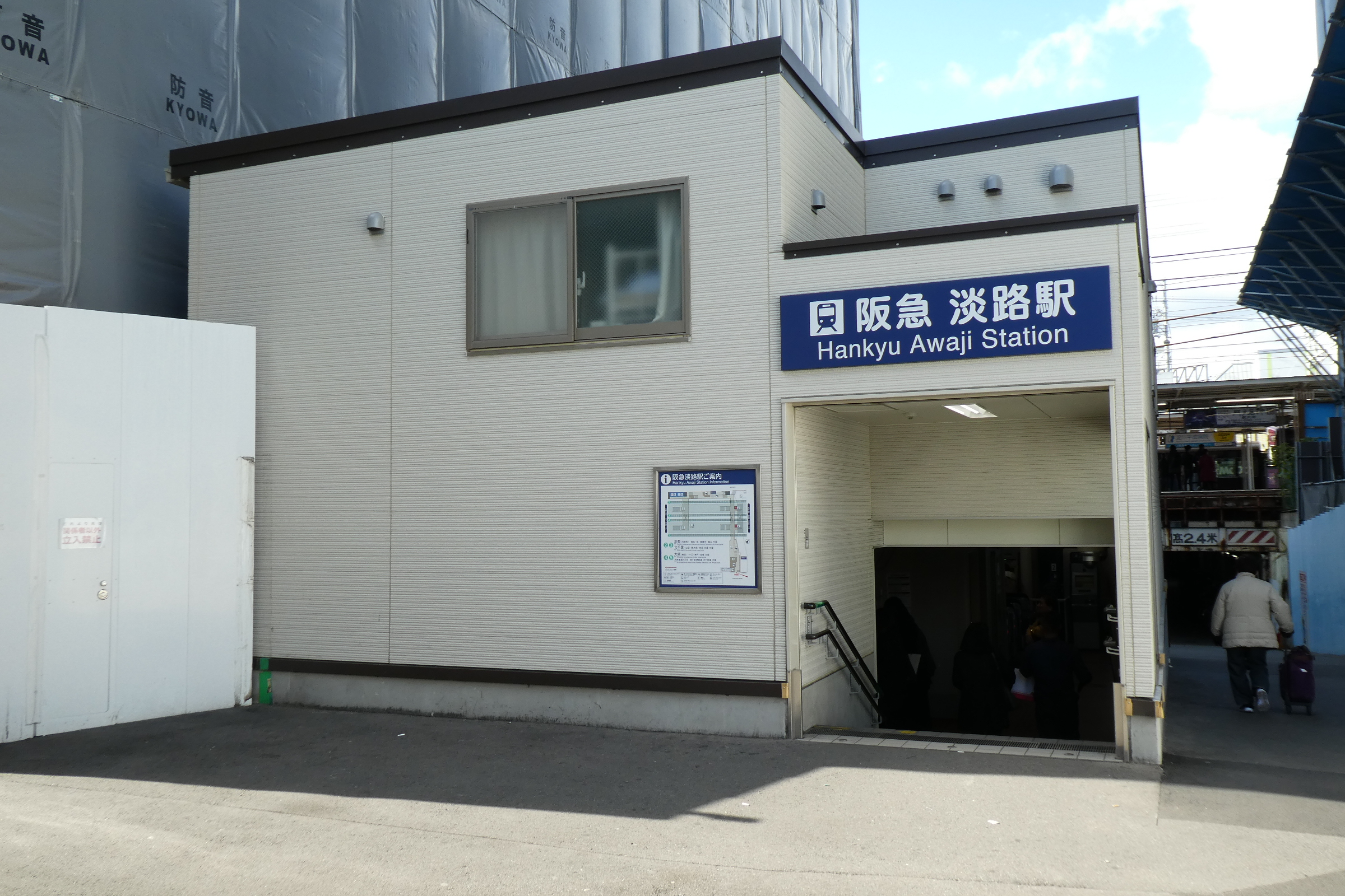 阪急淡路駅東口（仮駅舎）